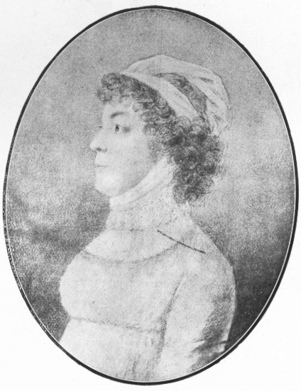 Johanne Friederike Rechsgräfin Reuß